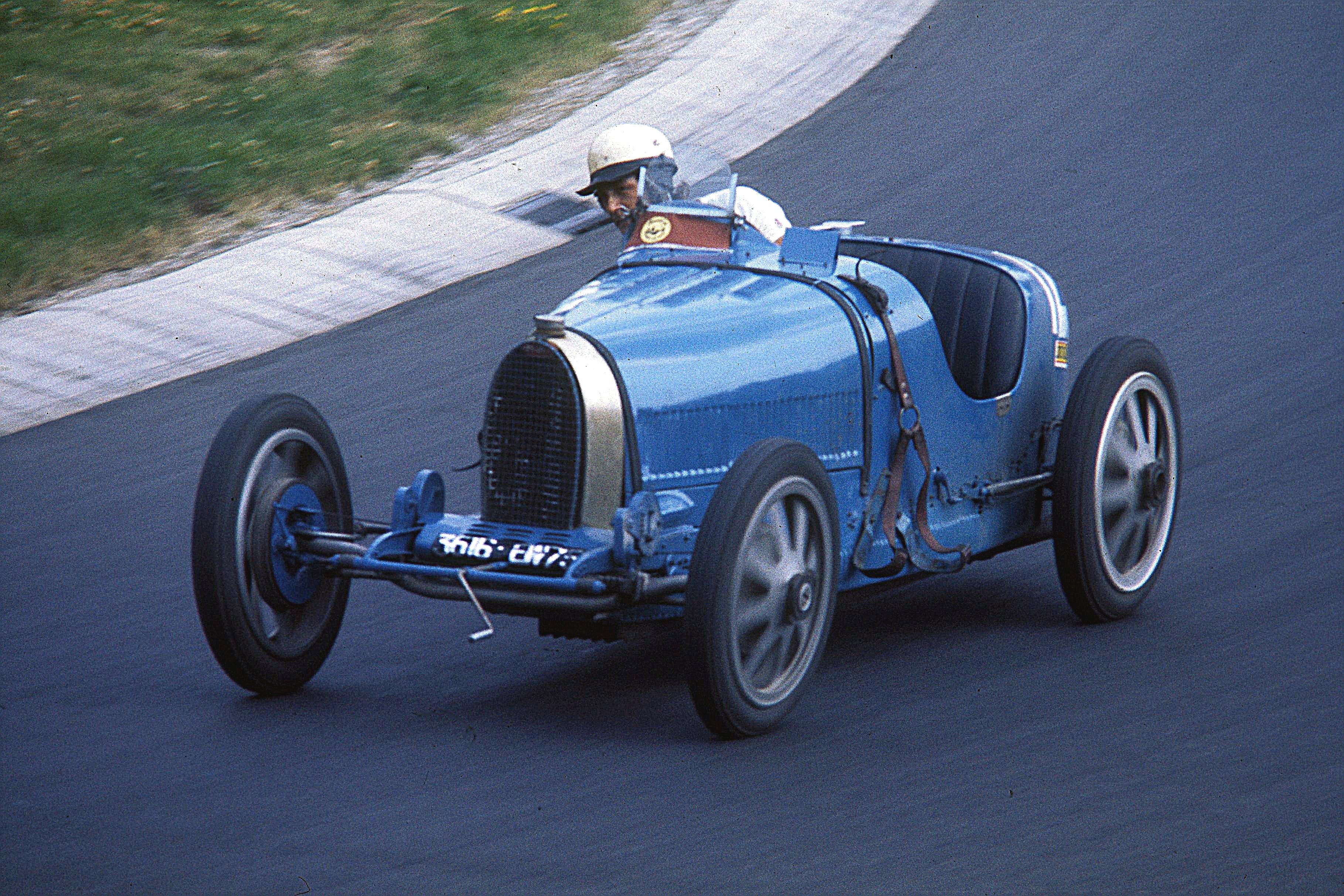 Bugatti Type 35, Baujahr 1924, beim Oldtimer-Grand-Prix 1976 auf dem Nürburgring. Daten: 8-Zyl.-Reihenmotor, 1991 cm³, 95 PS bei 5000/min, Fahrzeuggewicht 845 kg, 168 km/h; Fahrer: Marc Nicolosi